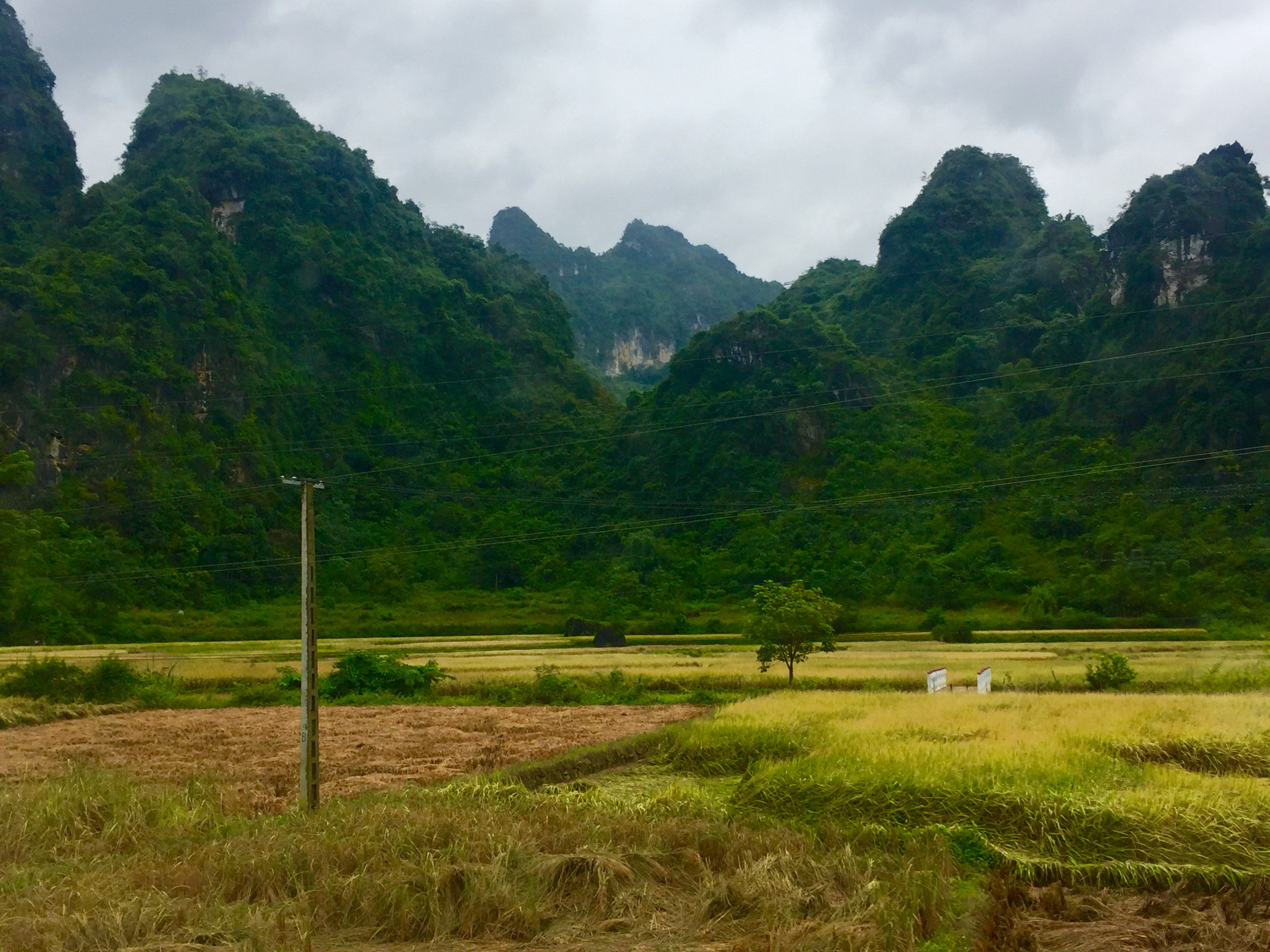 Hòa An District, Cao Bang, Vietnam